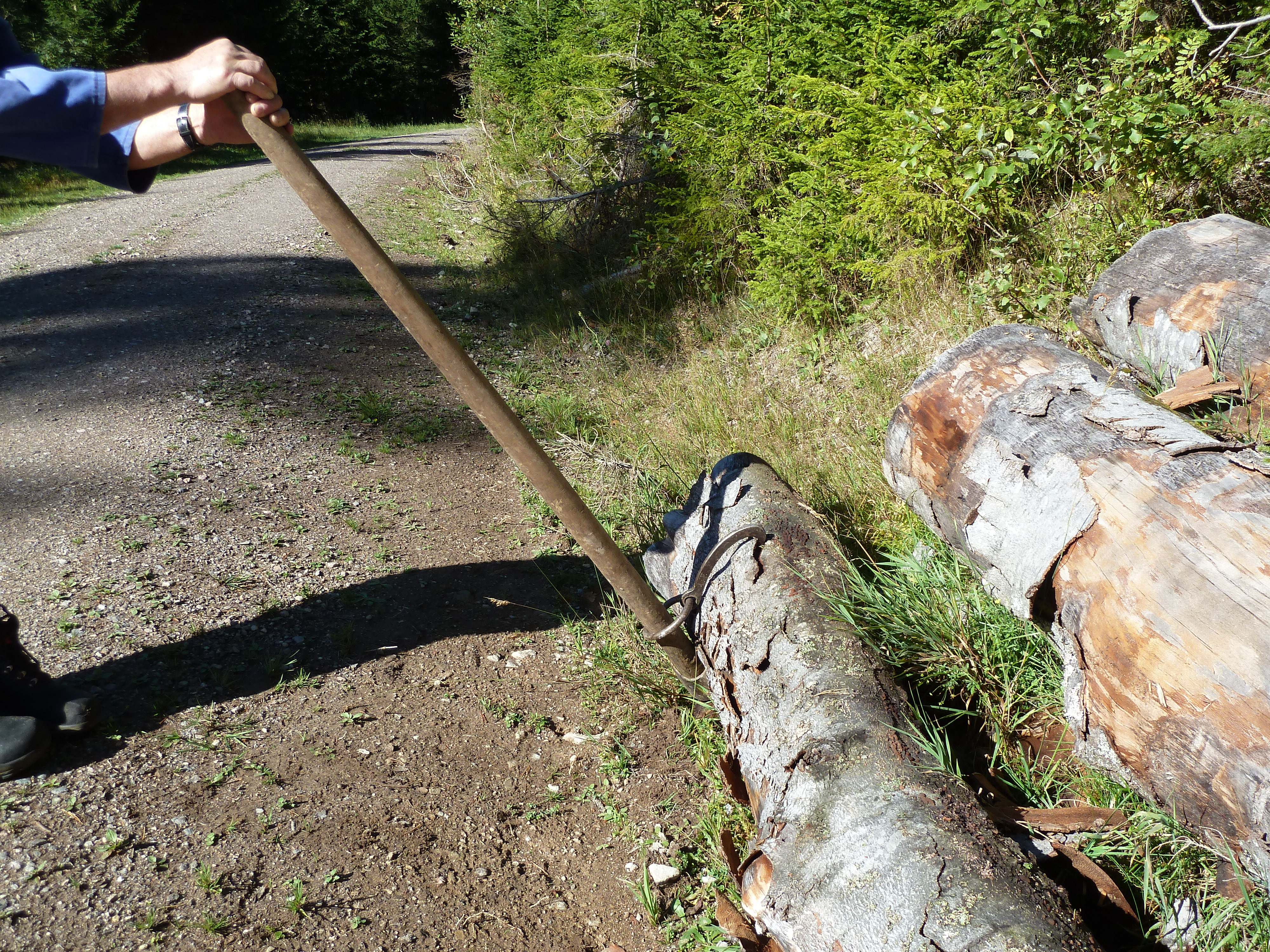 "Krempen" und Wendehaken im Einsatz